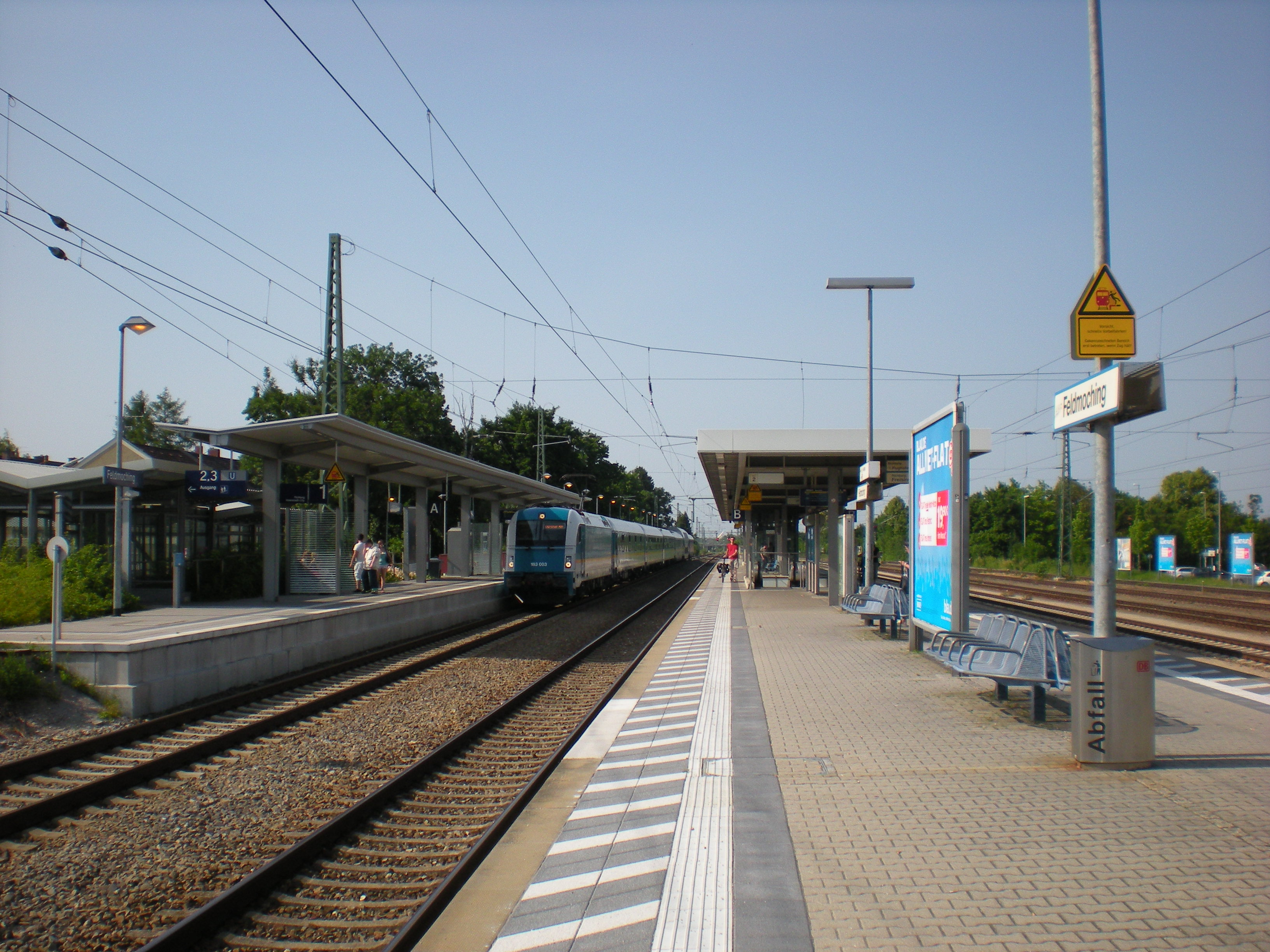 Bahnsteige des Bahnhofs München-Feldmoching mit durchfahrendem alex